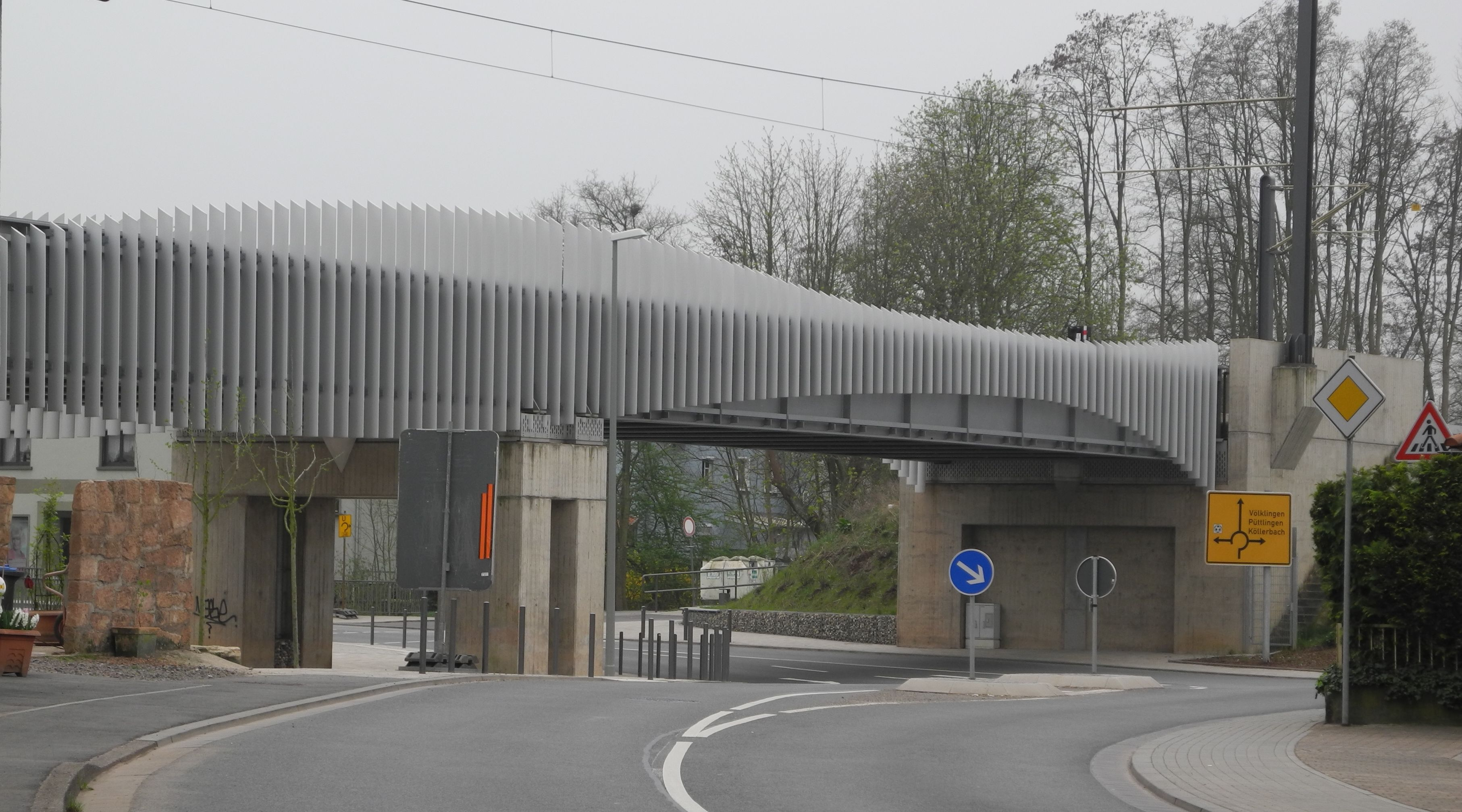 Die 2010 erneuerte Saarbahnbrücke (Eisenbahnüberführung über die L136) in Walpershofens Dorfmitte - aufgenommen aus der Heusweiler Straße